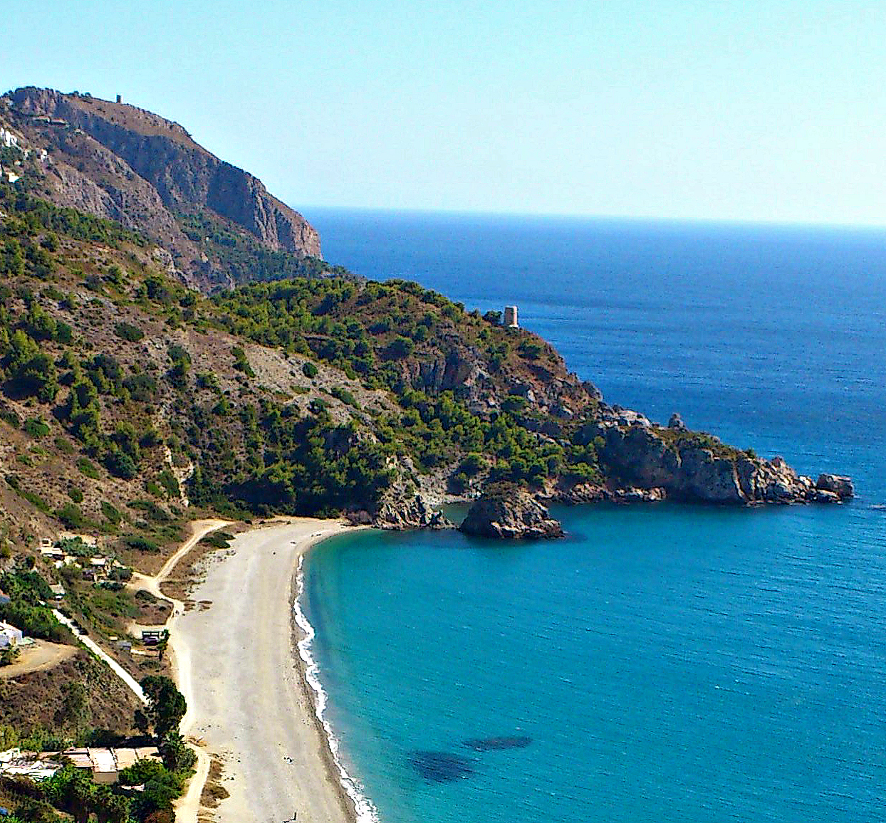 Vista de Torre Caleta (Nerja) y más al fondo Torre de Cerro Gordo (Almuñécar).